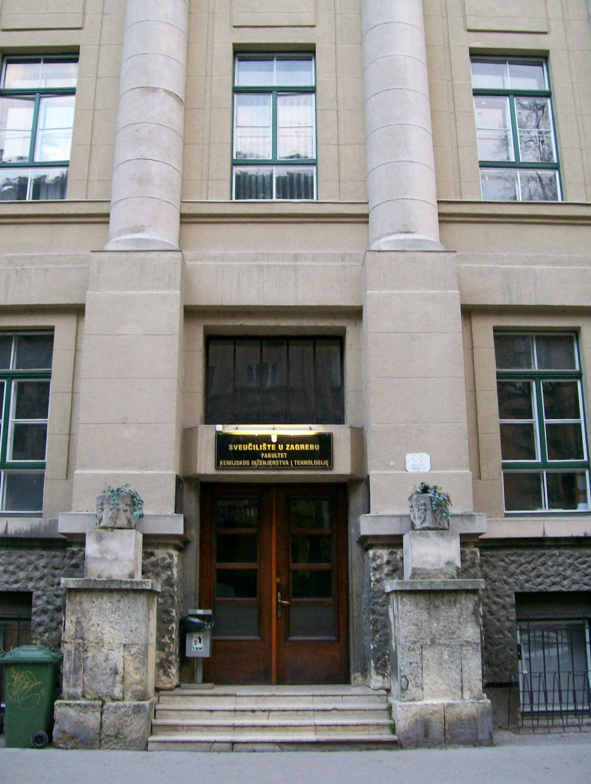 Fakultet kemijskog inženjerstva i tehnologije u Zagrebu